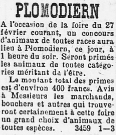 Extrait du journal L'Ouest-Éclair concernant un concours d'animaux à Plomodiern en février 1905.